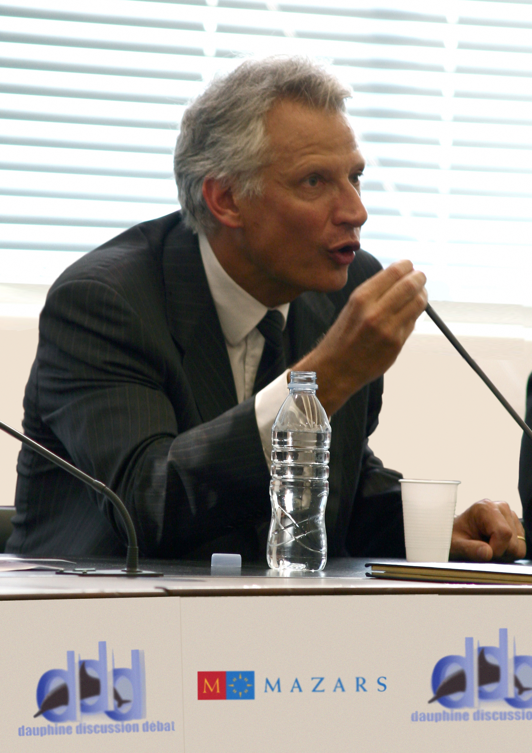 Dominique de Villepin devant les étudiants de l'université Paris-Dauphine le 6 mai 2008.